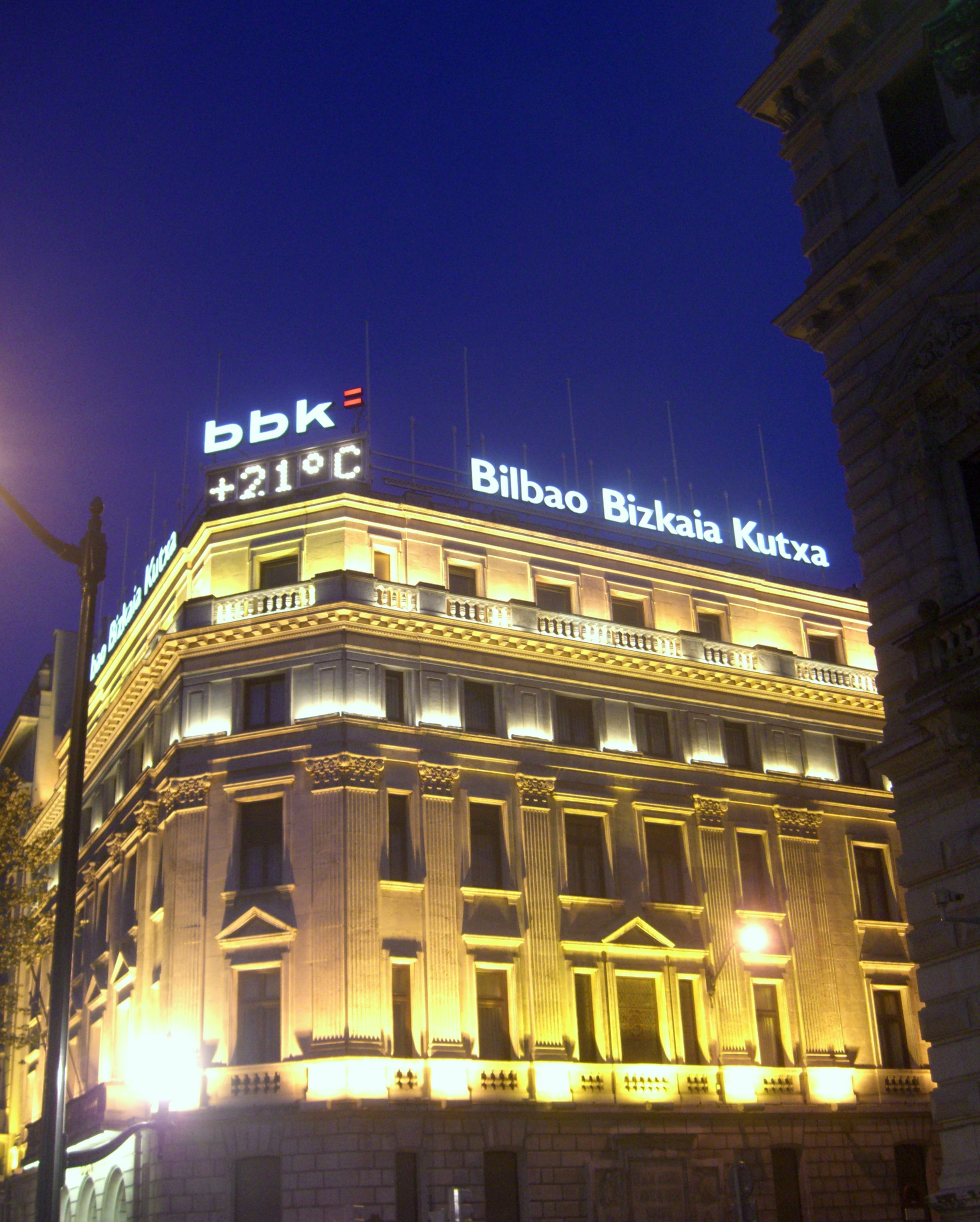 Edificio de la Bilbao Bizkaia Kutxa, antigua sede de la Caja de Ahorros Municipal de Bilbao, en Bilbao, España.